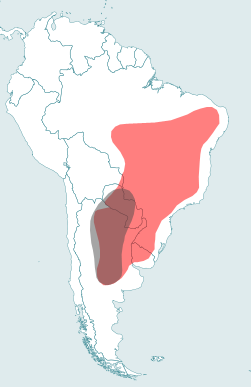 Kompara ekzistareo de Cariama cristata kaj Chunga burmeisteri, en mapo de Sudameriko kun landlimoj